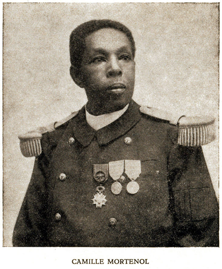 Sosthène Héliodore Camille Mortenol (1859-1930) est un officier supérieur guadeloupéen, défenseur de Paris et capitaine de vaisseau.